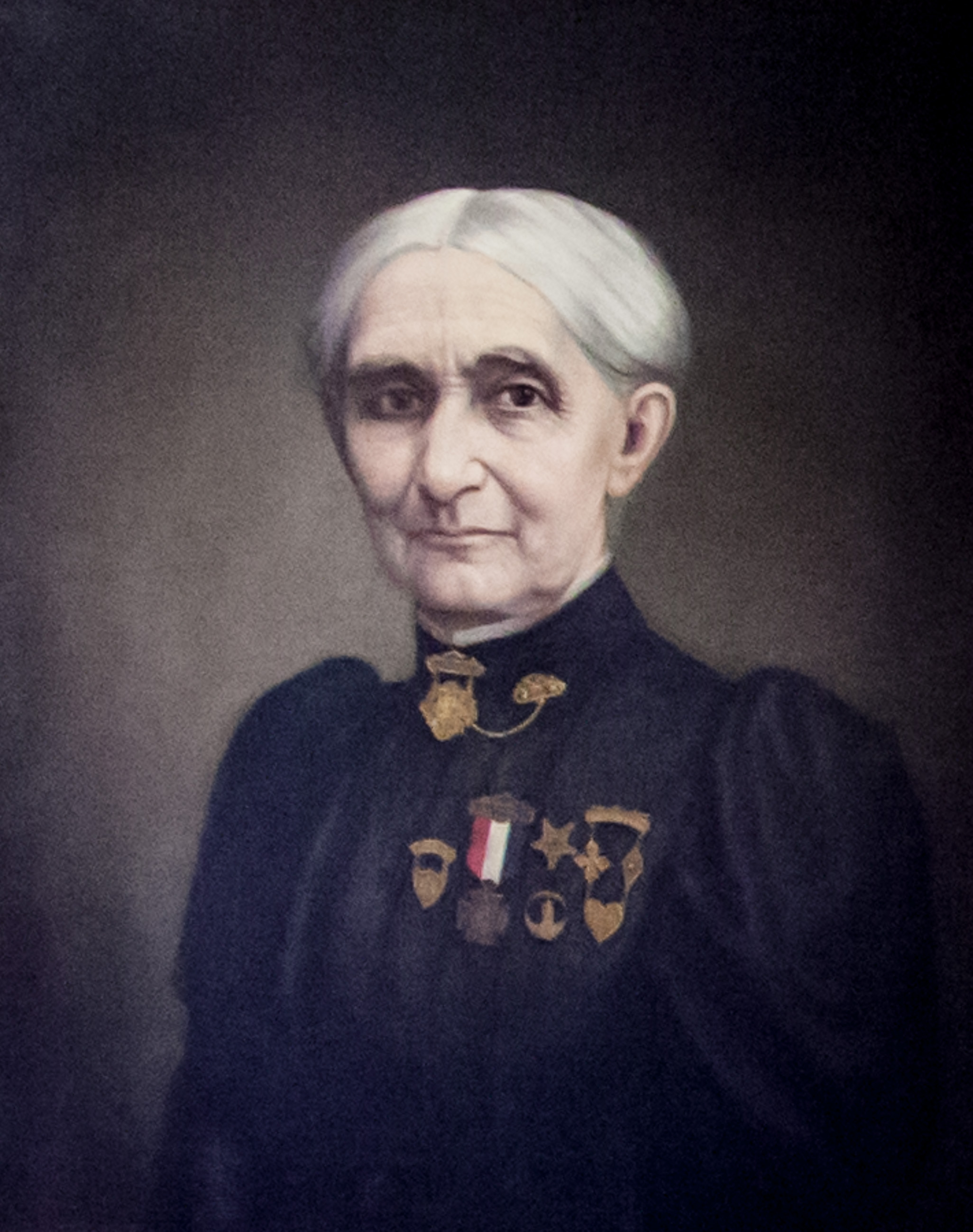 Harriet Patience Dame.